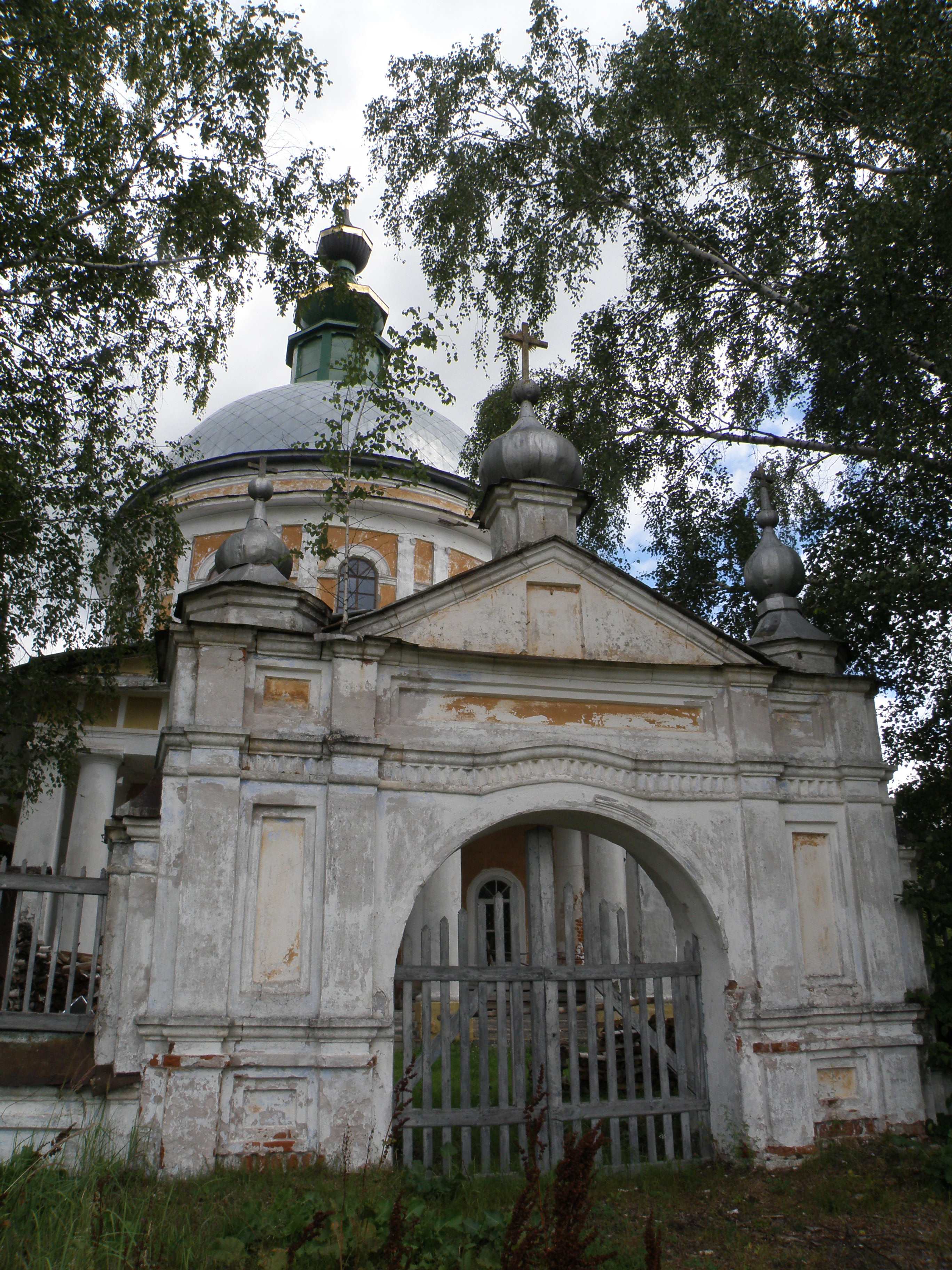 Церковь в Палищах